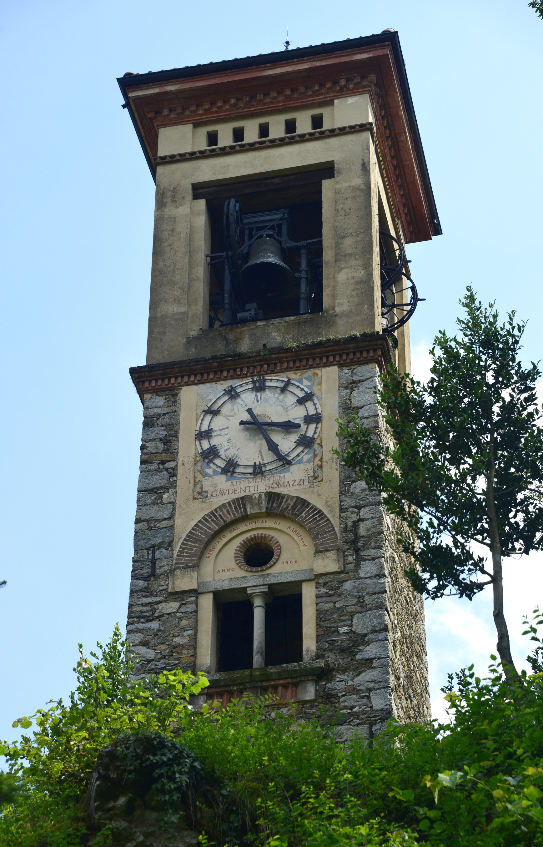 Campanile Chiesa di Sant'Ambrogio